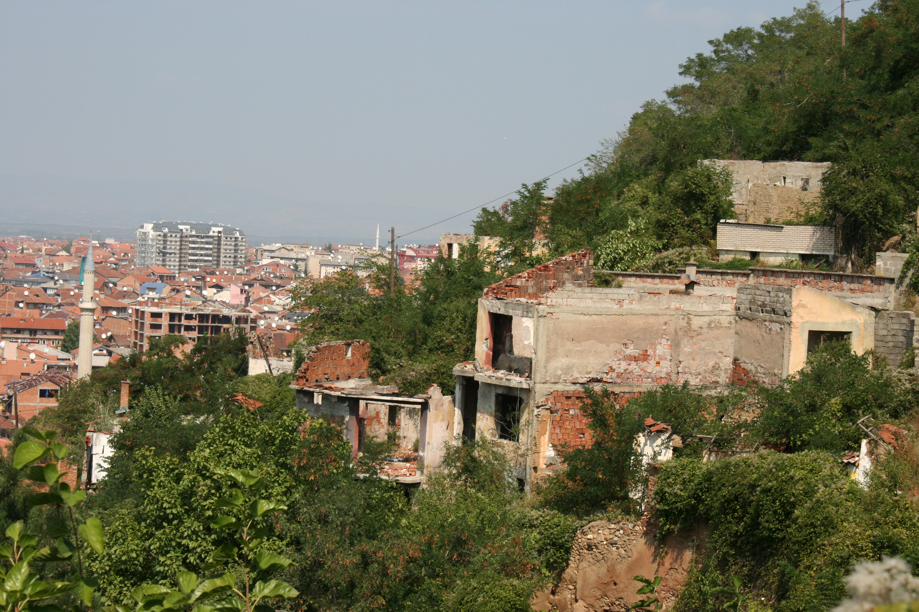 Concrete